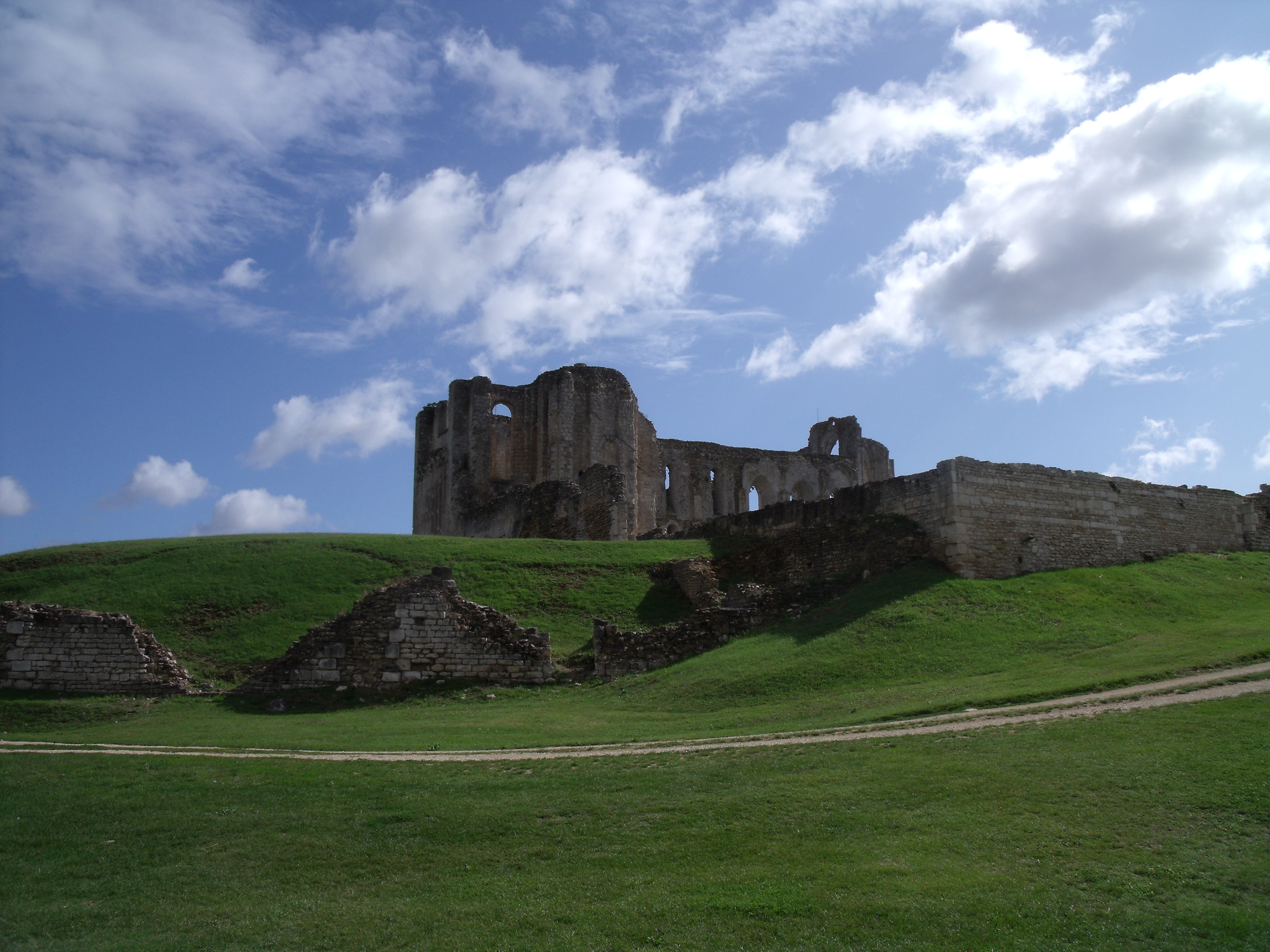 Les ruines de l'ancienne abbaye de Maillezais (Vendée) comprennent l'église abbatiale et son cloitre, le réfectoire, le dortoir des moines, la cuisine octogonale, les caves voûtées, les remparts avec leurs échauguettes. Ici l'église abbatiale, construite entre le XIe et le XIVe siècles. .